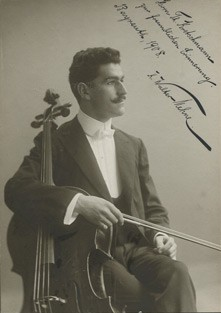 Kretschmann Theobald (1850-1919), český a rakouský violoncelista, dirigent a skladatel